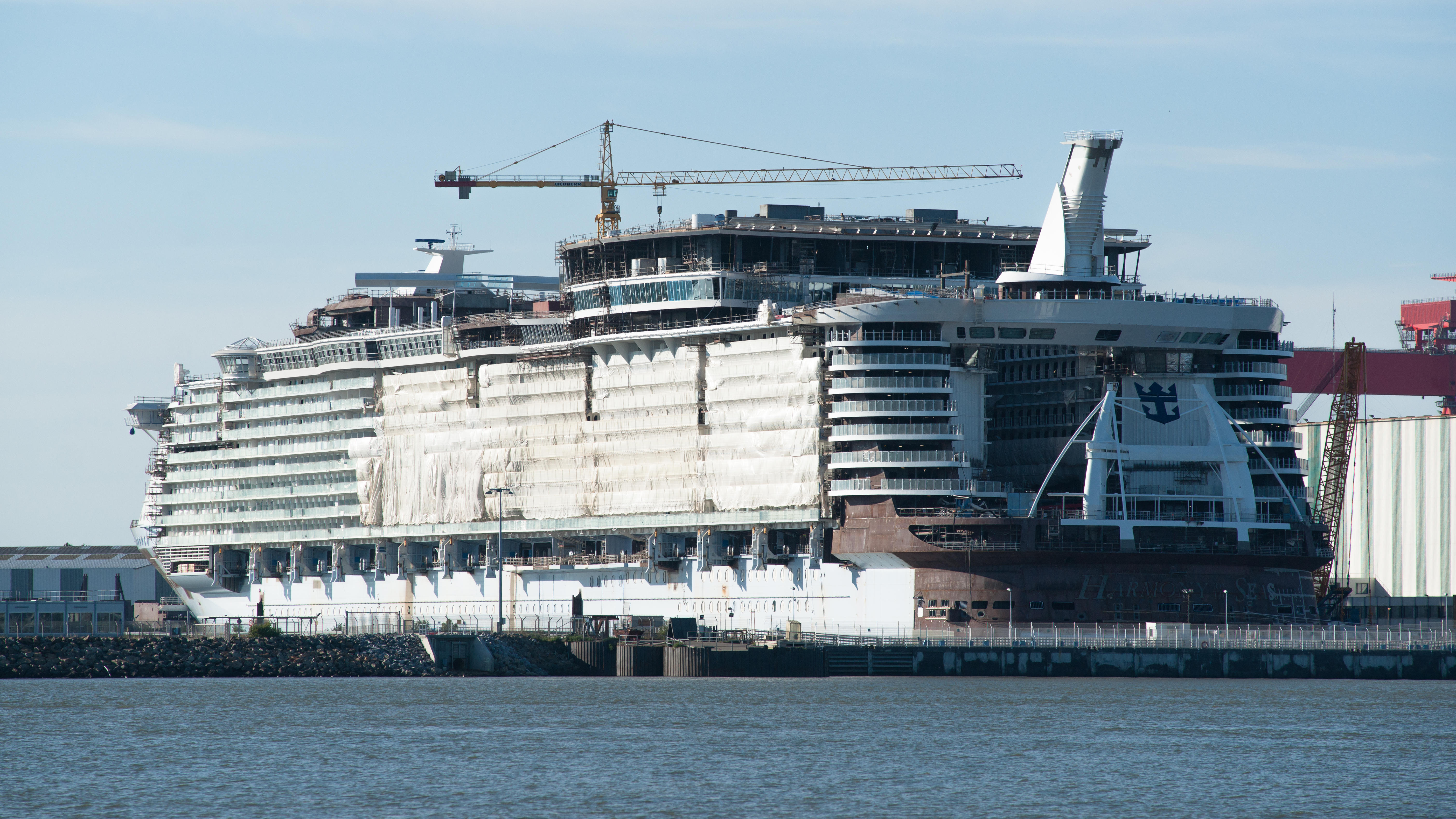 Record SNSM 2015 - Harmony of the Seas